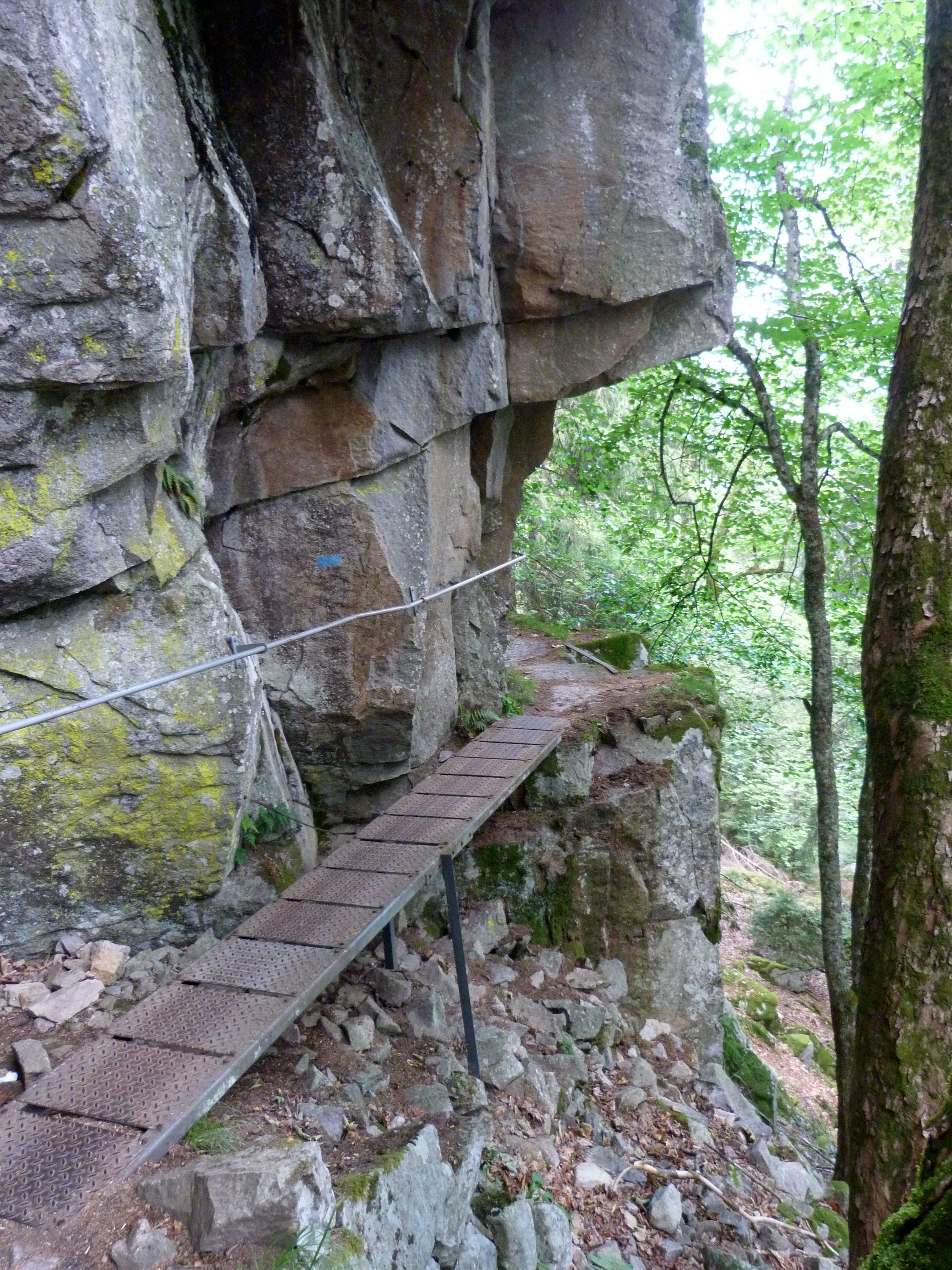 Passage du sentier des Roches (massif des Vosges).